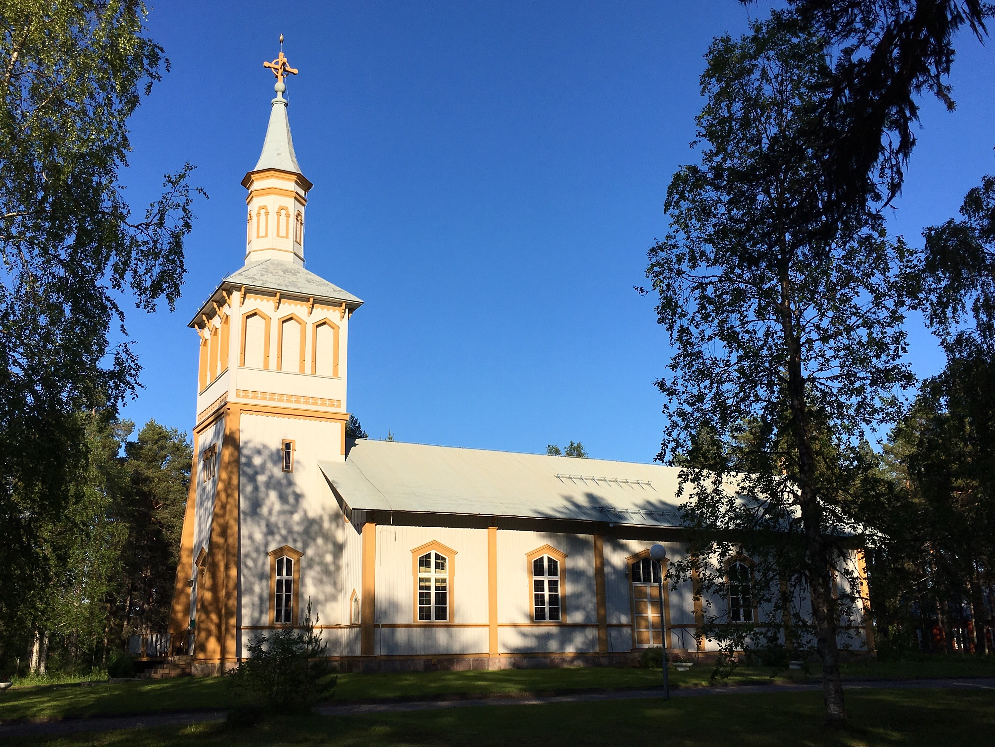 Tärendö kyrka är en kyrkobyggnad som tillhör Pajala församling i Luleå stift. Kyrkan ligger i samhället Tärendö i Pajala kommun.